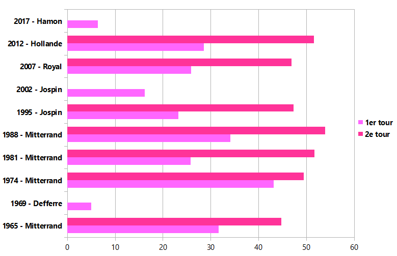 Graphique en bâton représentant le vote socialiste aux élections présidentielles françaises entre 1965 et 2017.